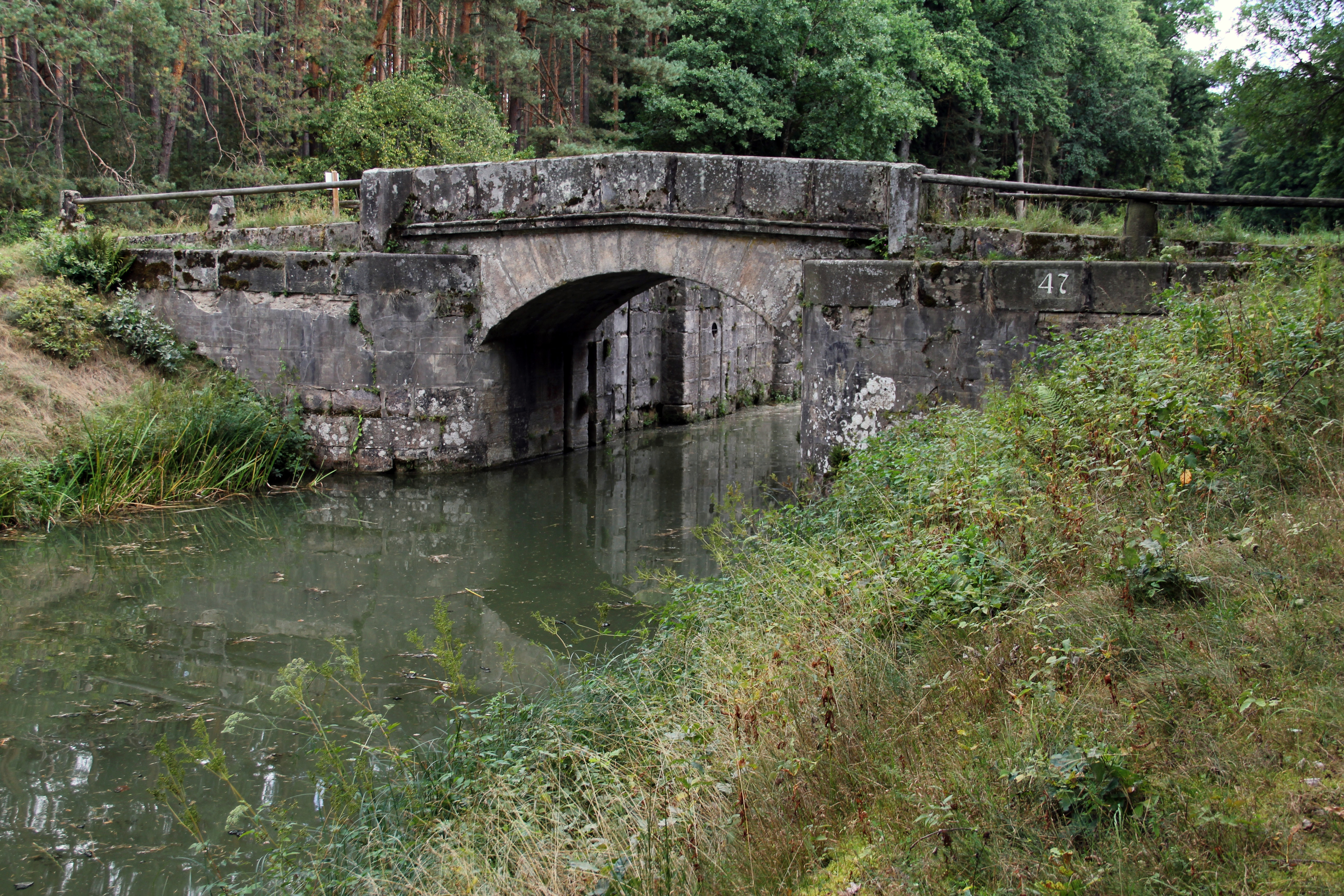 Schleuse 47, Ludwig-Donau-Main-Kanal